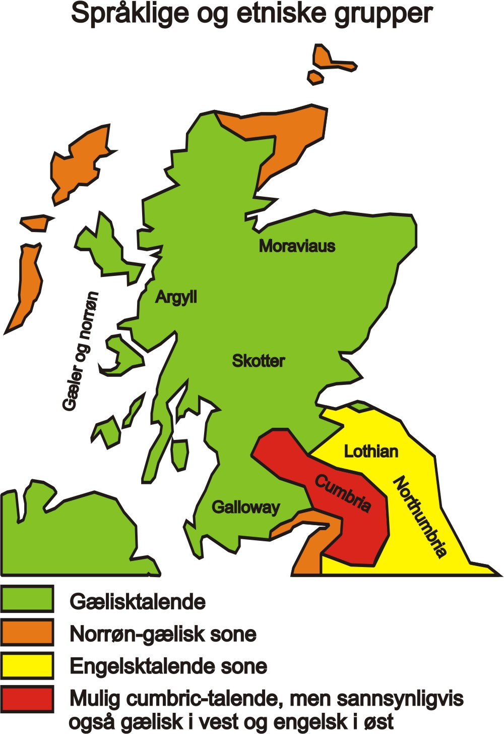 Forenklet kart over etniske og språklige grupper i høymiddelalderens Skottland. Jeg har selv tegnet kartet.